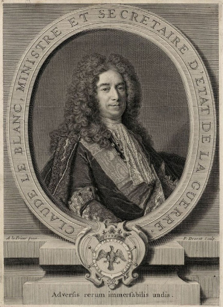 Claude Le Blanc (1669-1728), Ministre et secrétaire d'Etat de la Guerre, par Pierre Drevet et Adrien Leprieur.